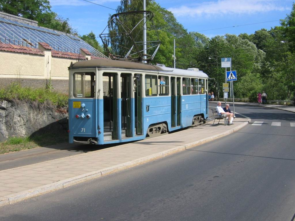 Stockholms Spårvägar Class A25G no. 71 at Waldemarsudde at Djurgårdslinjen in Stockholm. This tram is originally from Malmö but have been at Djurgårdslinjen since 1992. More information about this tram at Swetramway.